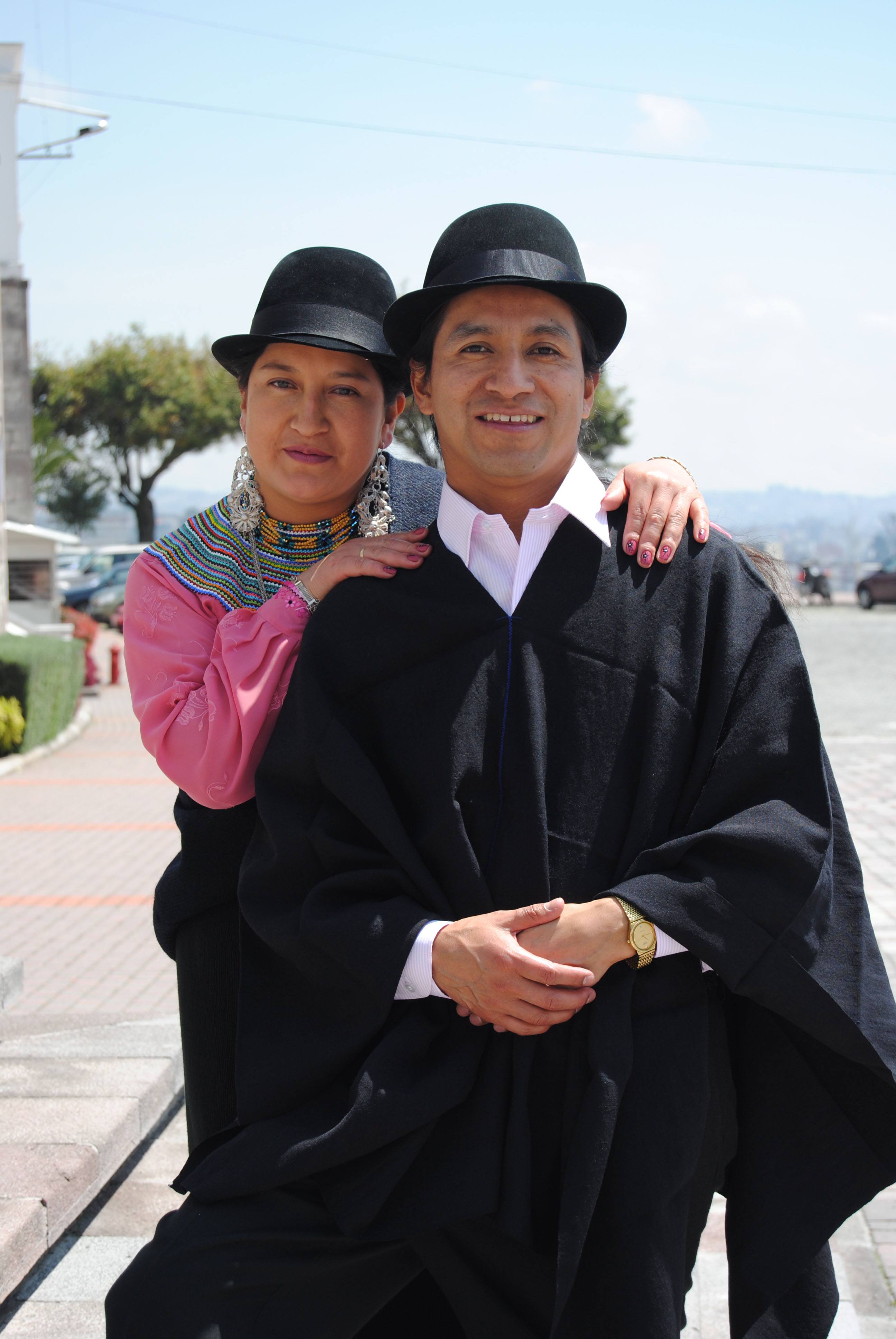 Artistas y Músicos ecuatorianos